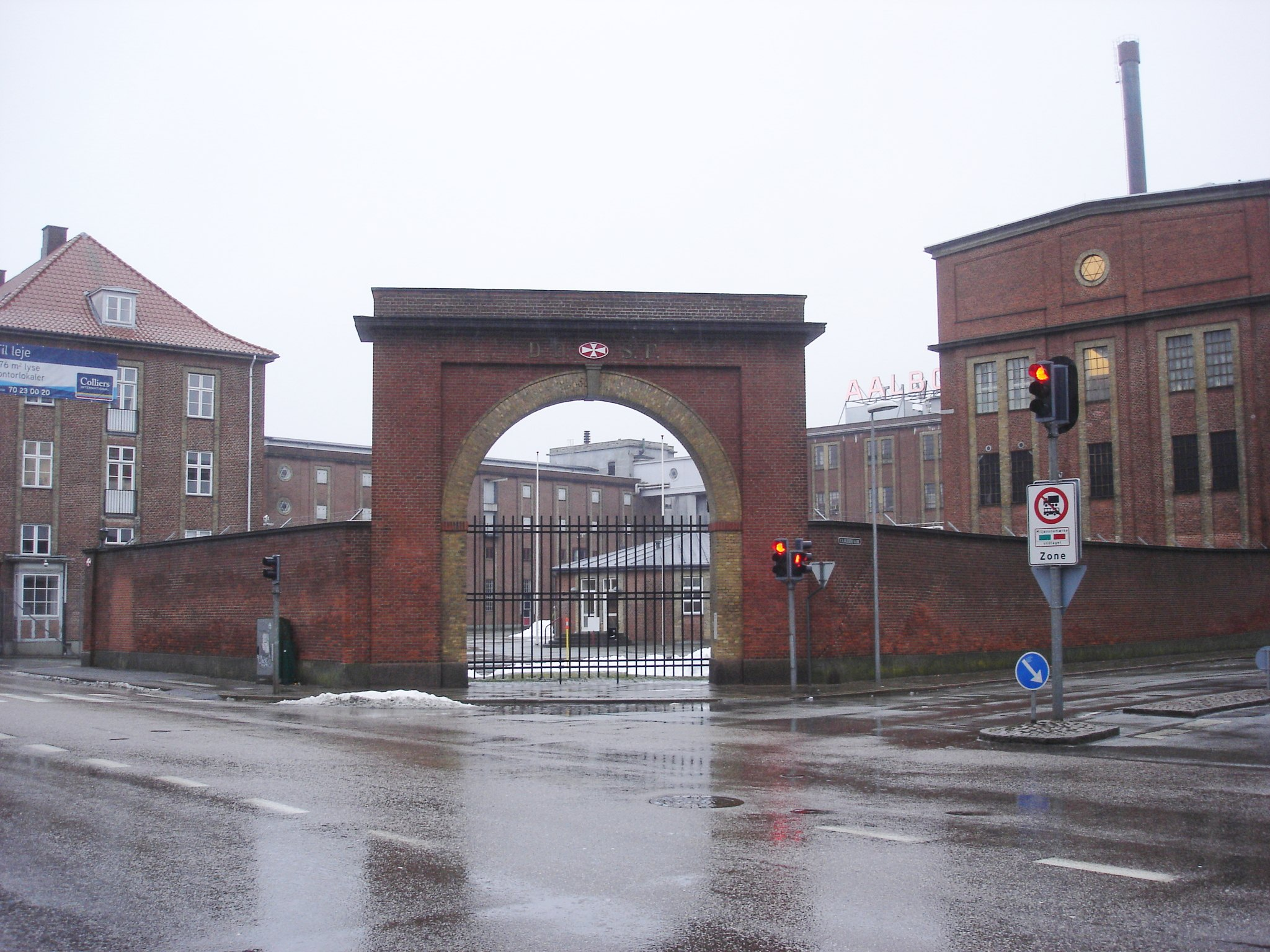 Gennem denne port gik Aalborg Havnebane ind til Spritfabrikkerne